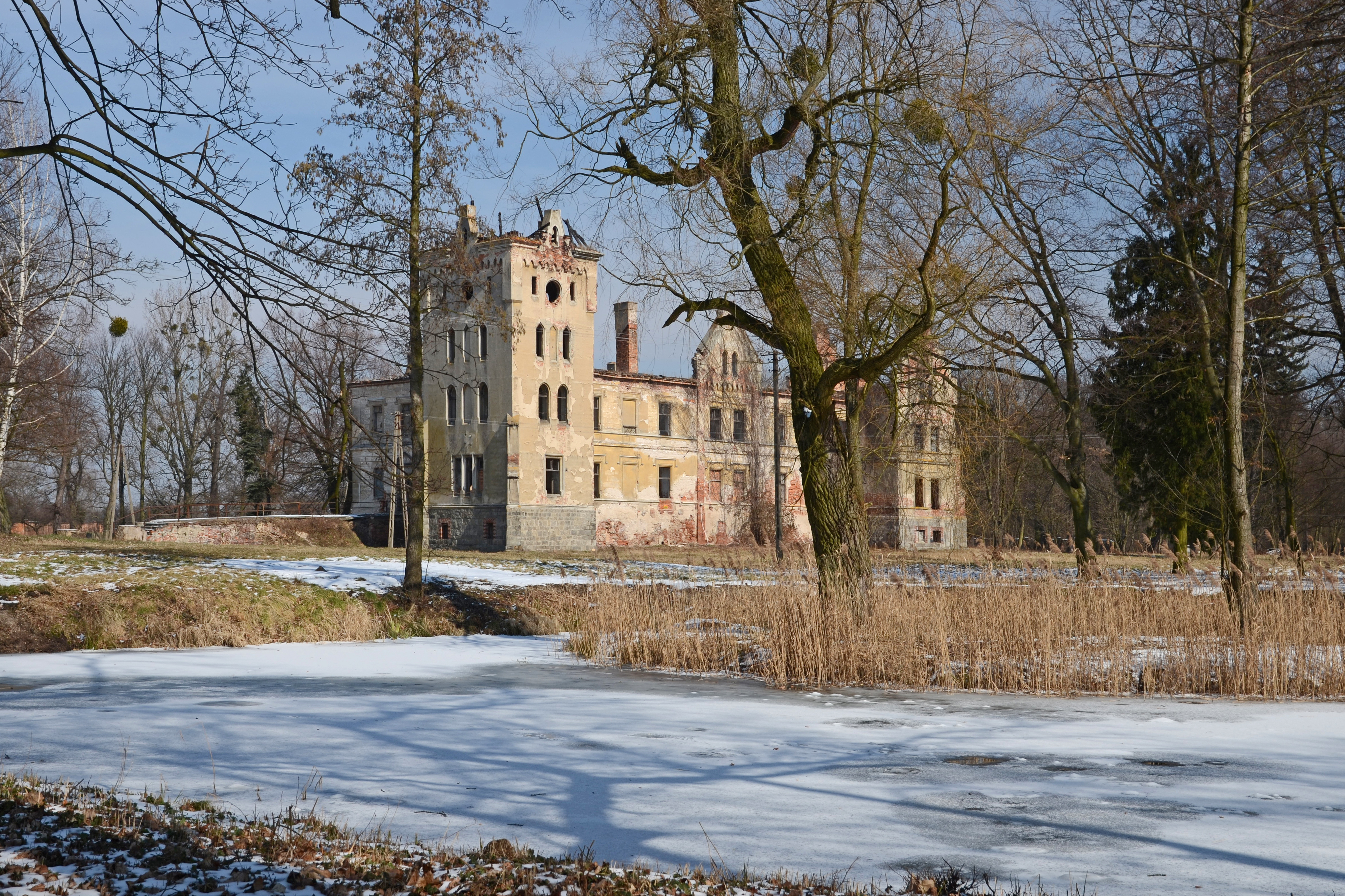 Gałów, pałac, zima, ruiny